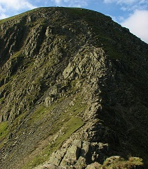 A Lake District sziklái Északnyugat-Angliában